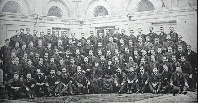 Baltasar saldoni: Diccionario Biográfico-bibliográfico, T. 3, p. 304